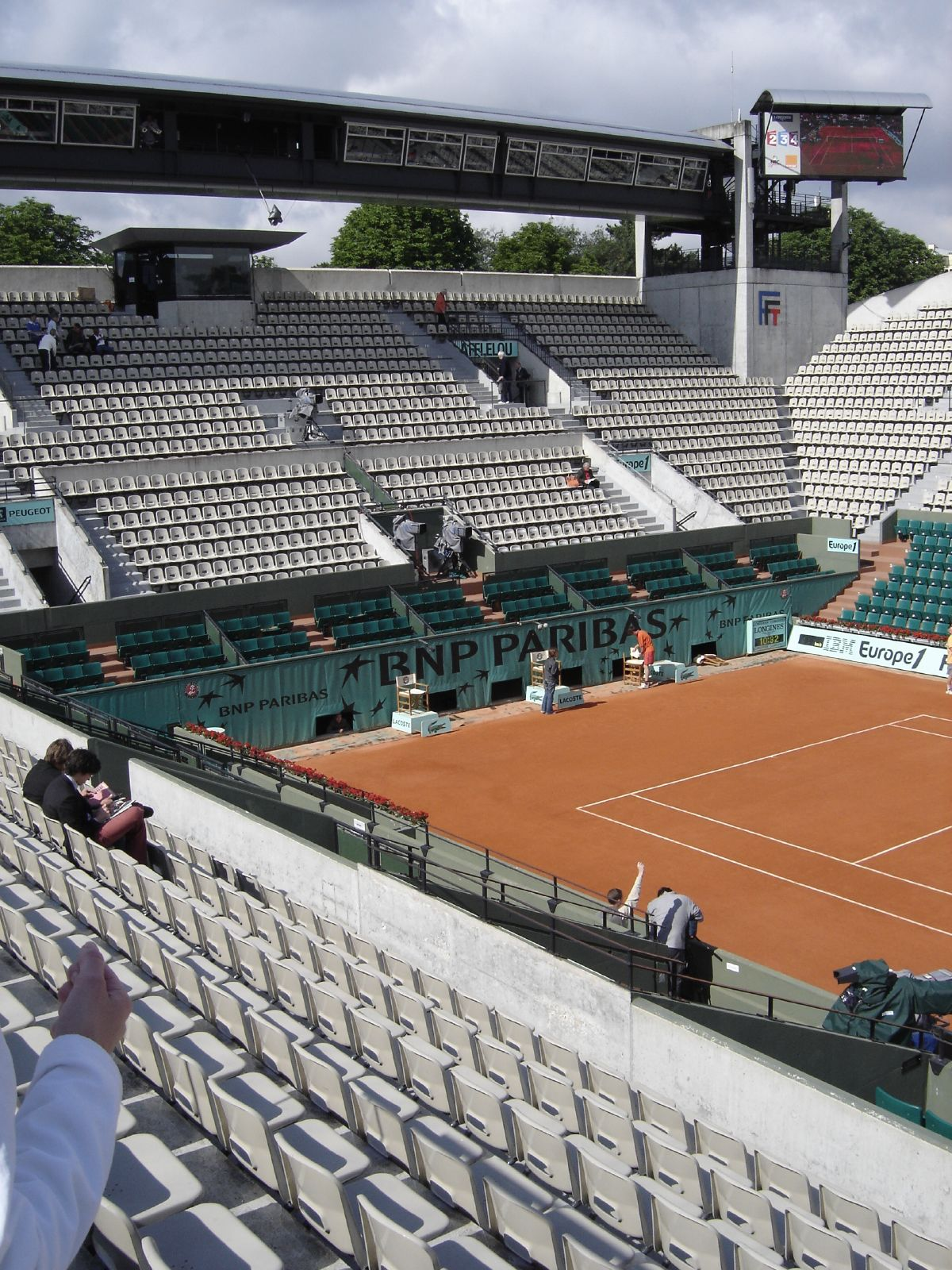 Stade Roland Garros , Paris France